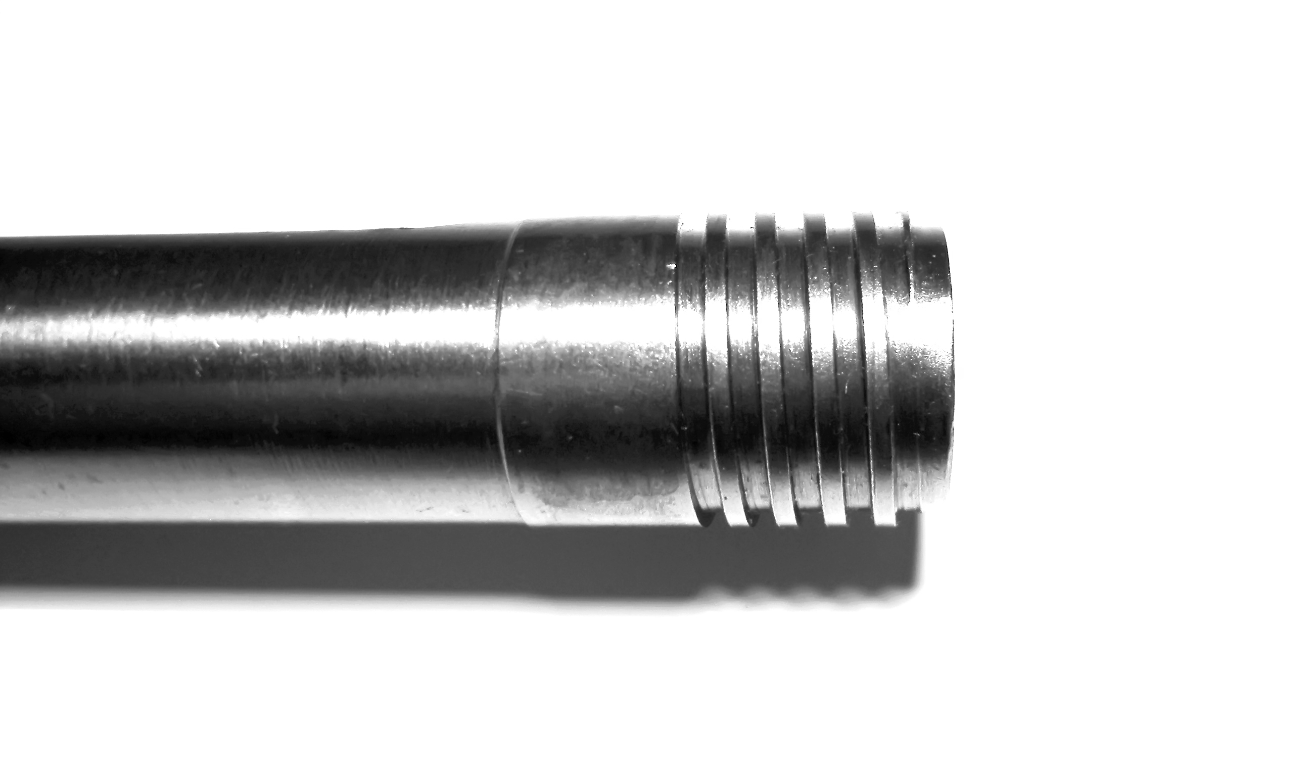 Culasse du système de 1911, détail du cylindre